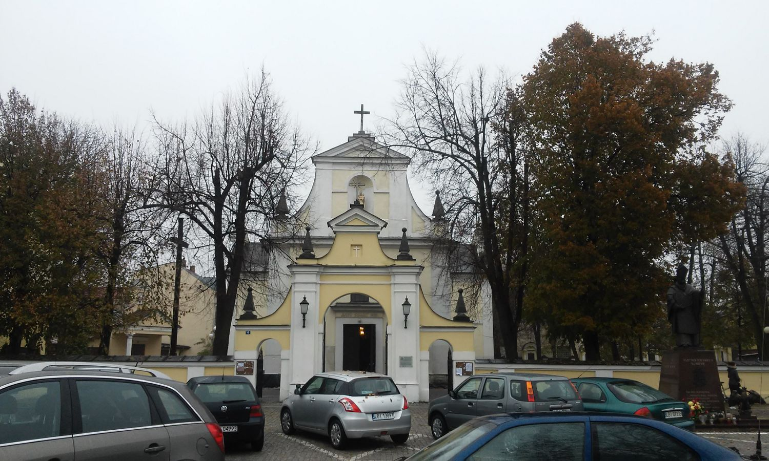 Kościół św. Józefa, dawniej cerkiew, w Międzyrzecu Podlaskim